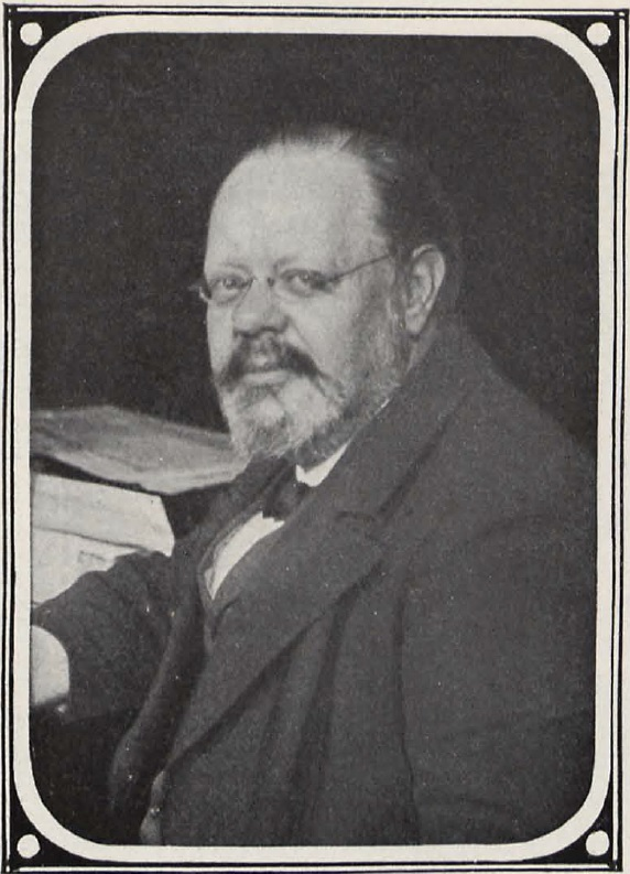 Arthur Levysohn, Journalist in Österreich und Deutschland (1841-1908).